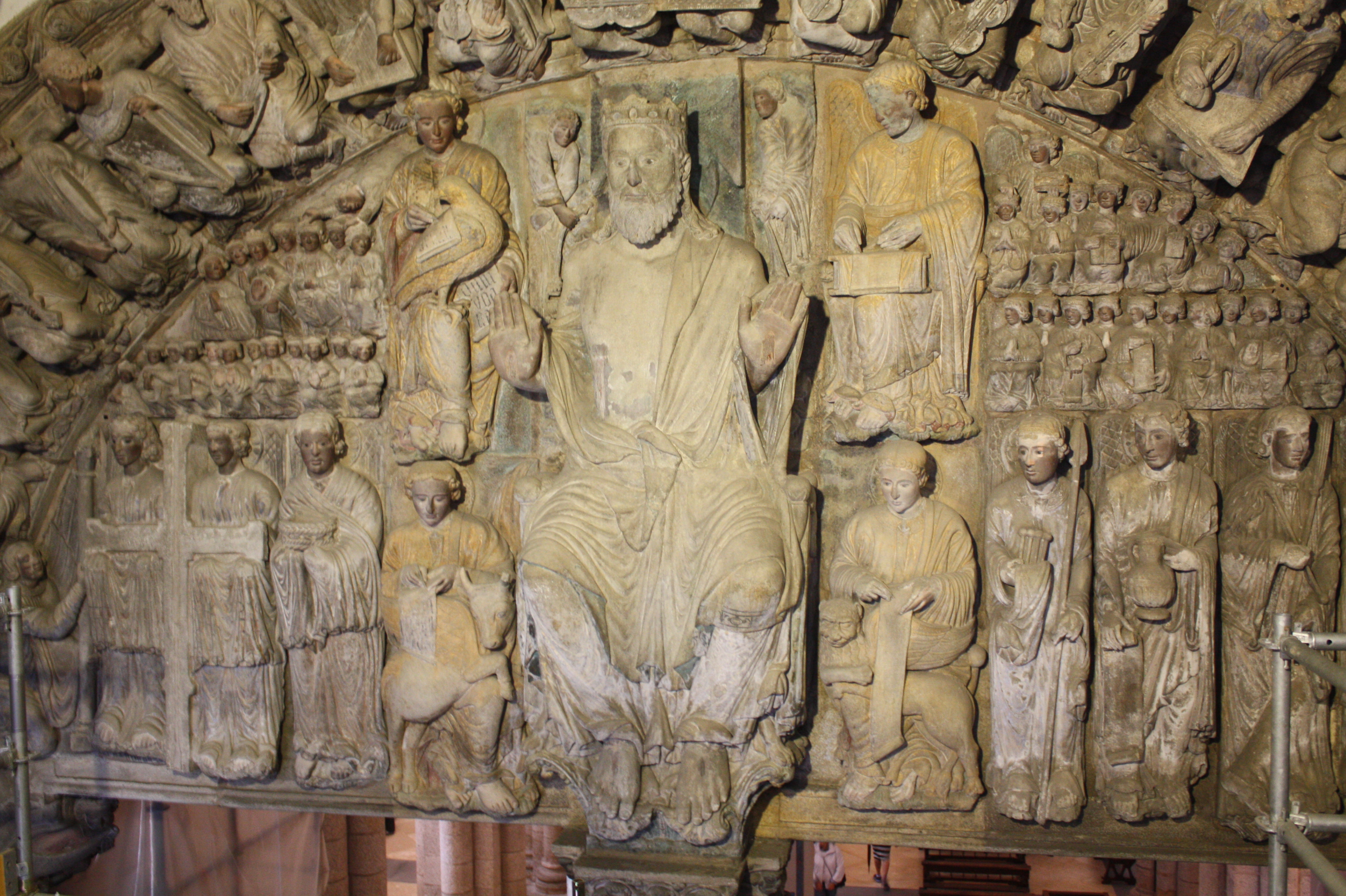 Tímpano principal do Pórtico da Gloria.